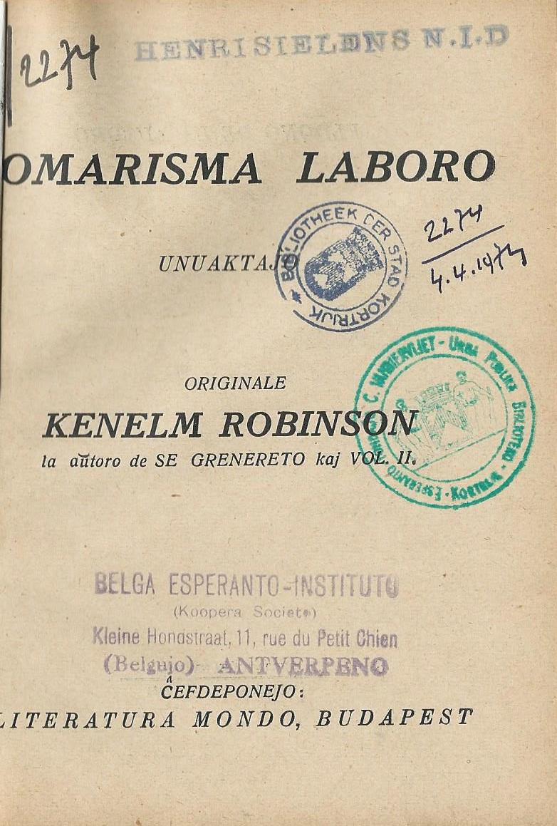 librokovrilo de libro "Homarisma Laboro", 1931